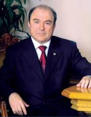 Губерський Леонід Васильович — академік АН вищої школи України